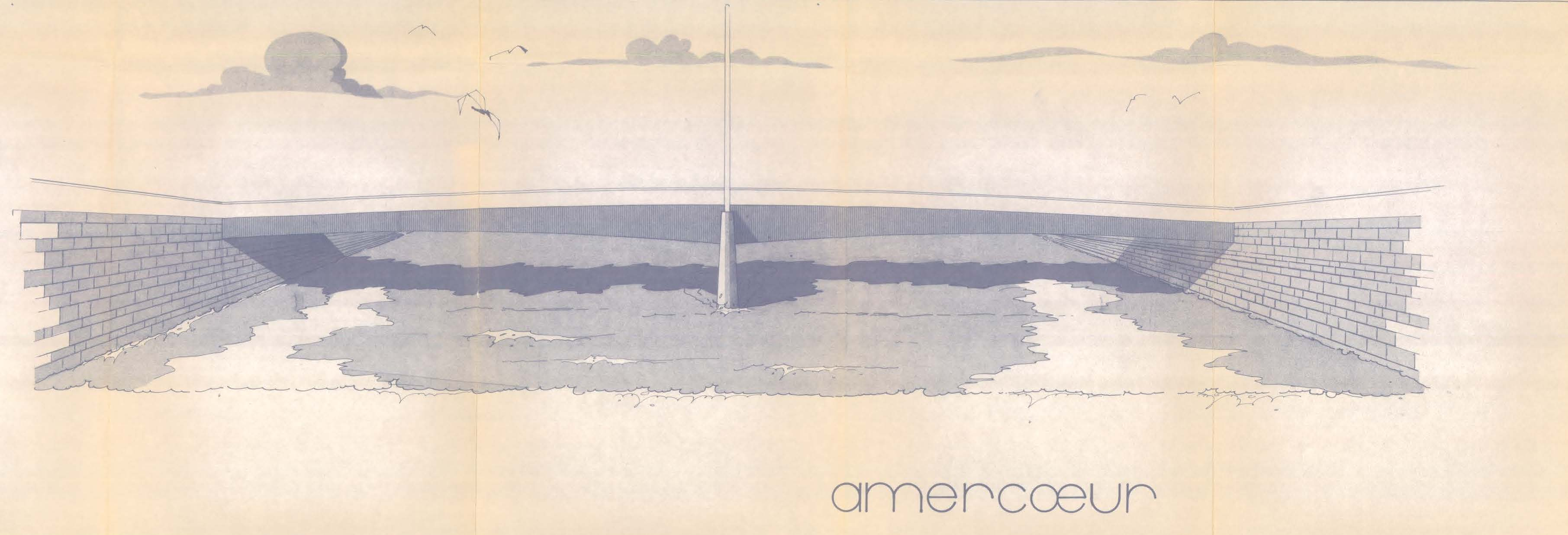 Schéma réalisé pour la Direction des Routes de Liège